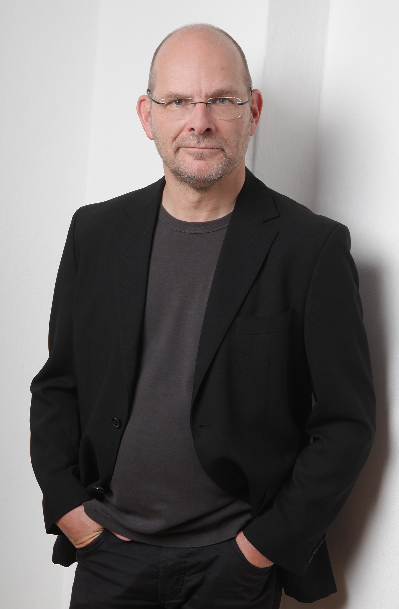 Porträtfoto Michael Sohn